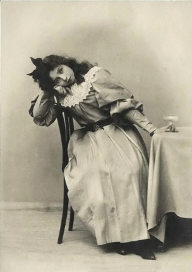 Вера Комиссаржевская в роли Рози в пьесе Г. Зудермана "Бой бабочек"